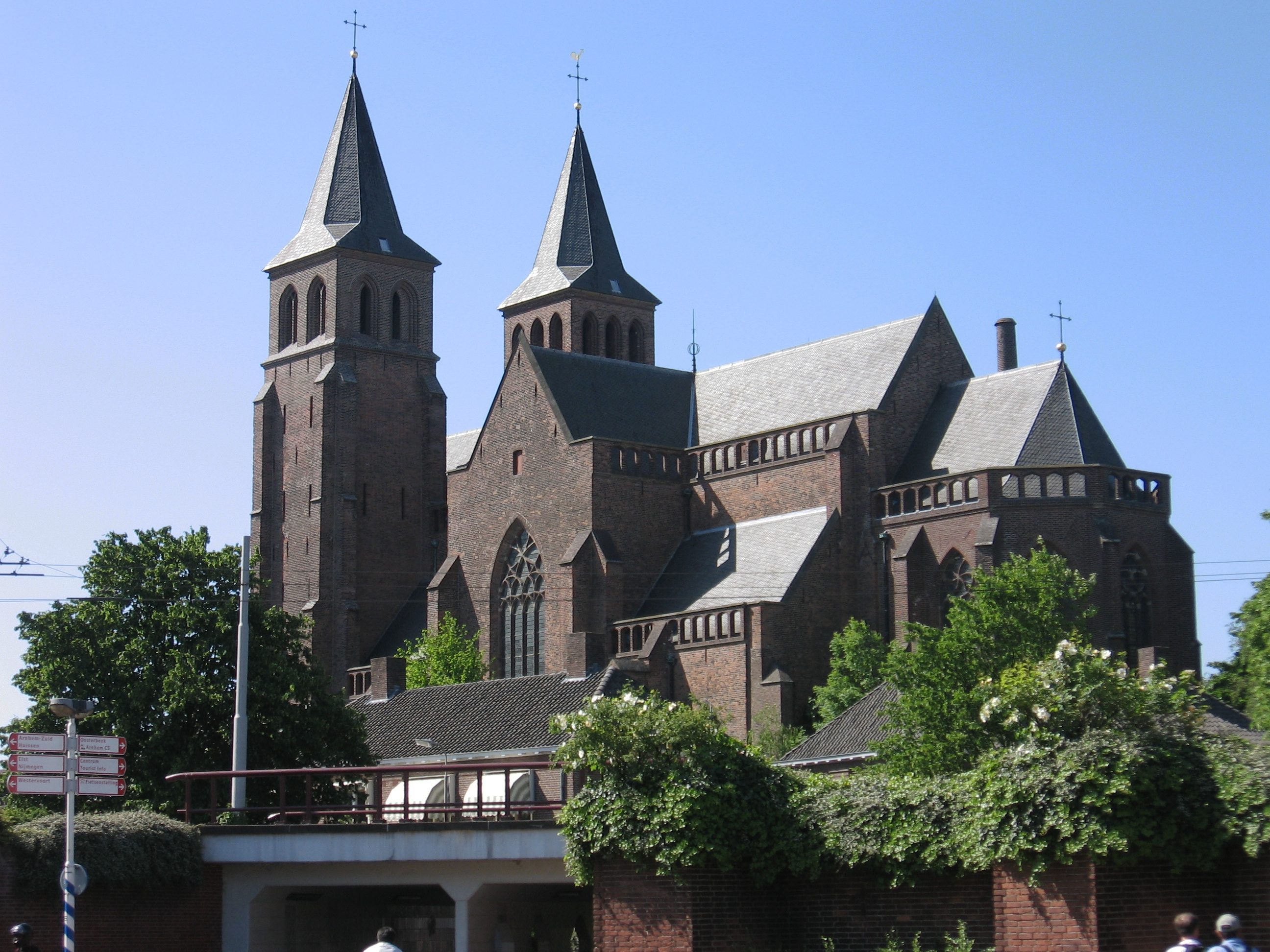 St. Walburgius-basiliek, Arnhem